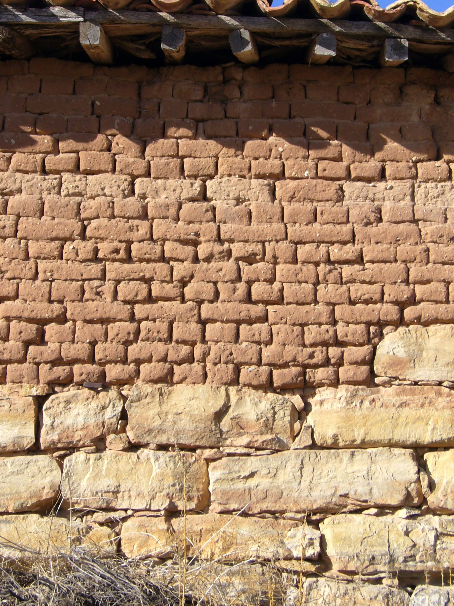 Pared construida en fábrica de bloques de adobe en la parte superior sobre una inferior de piedra. Imagen tomada de una antigua casa en Aguilar de Bureba (Burgos) España.